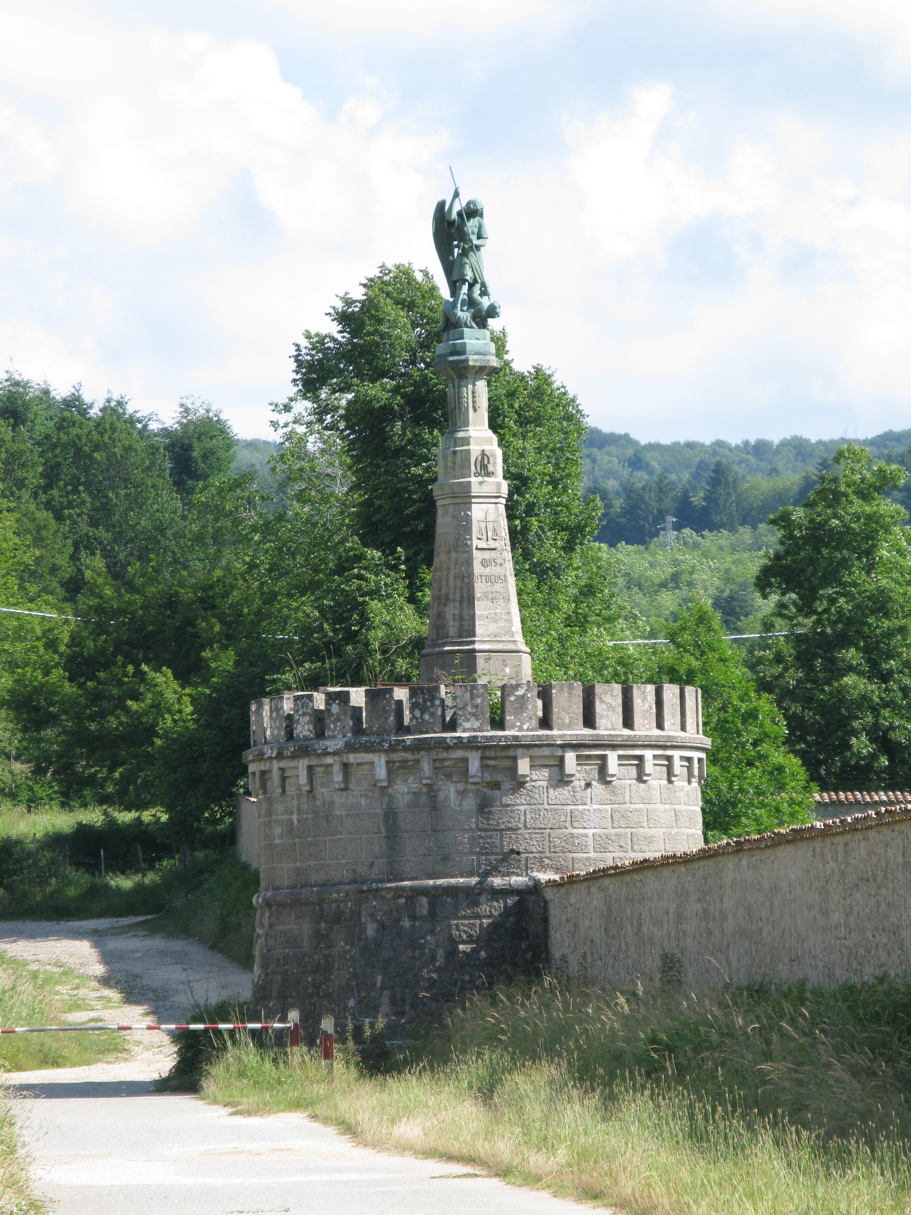 Torre di San Michele - Certosa di Serra San Bruno